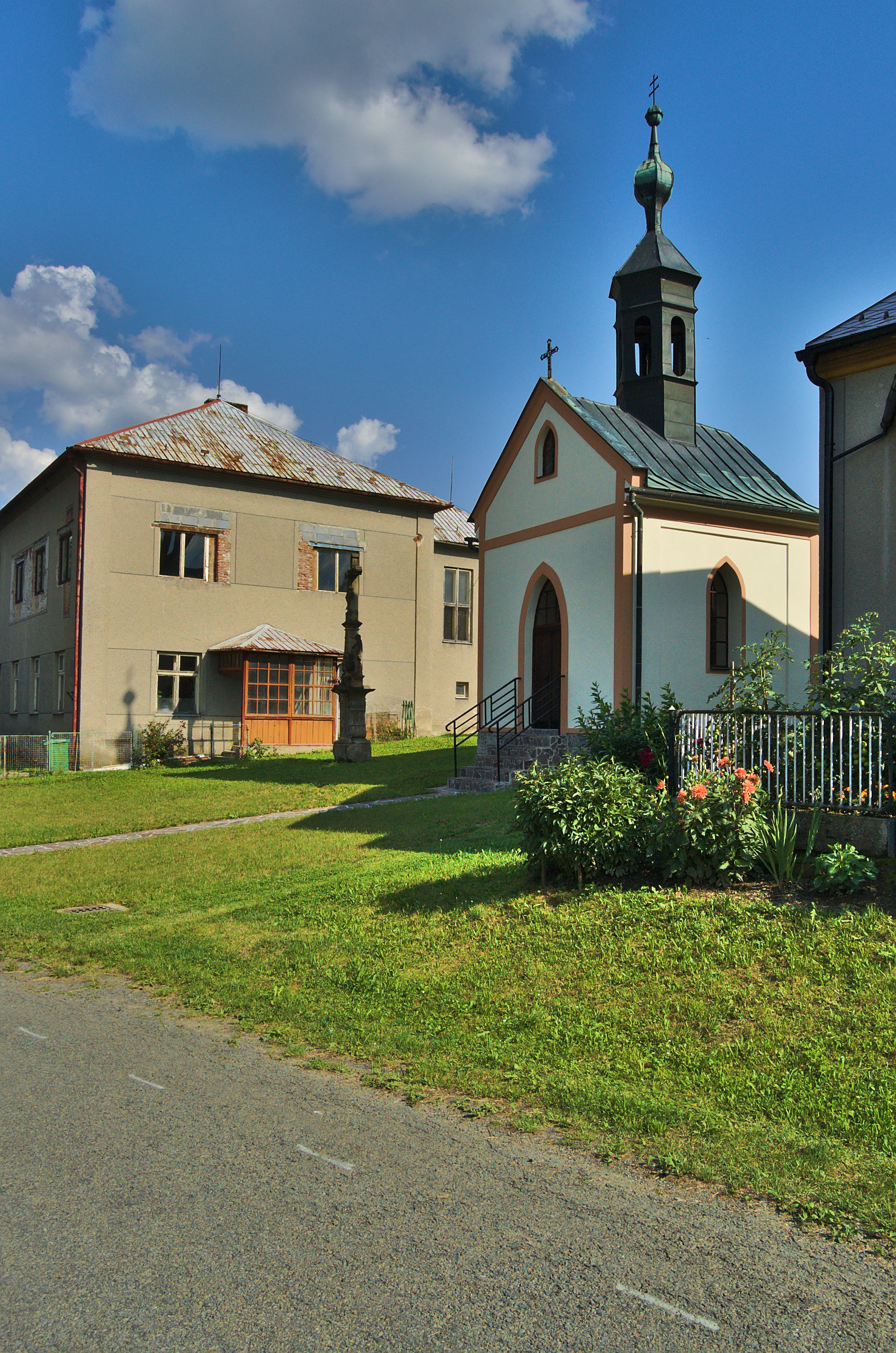 Kaple na návsi, Kozov, Bouzov, okres Olomouc